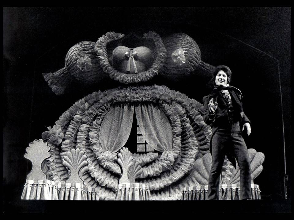 שידוכין